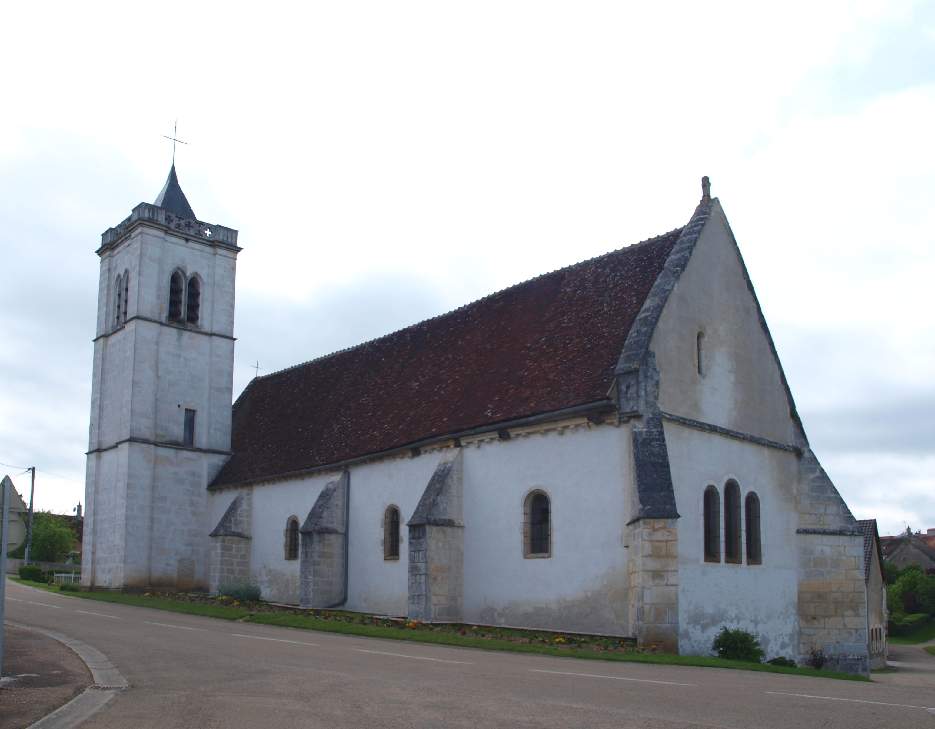 Fouronnes (Yonne, France) ; église